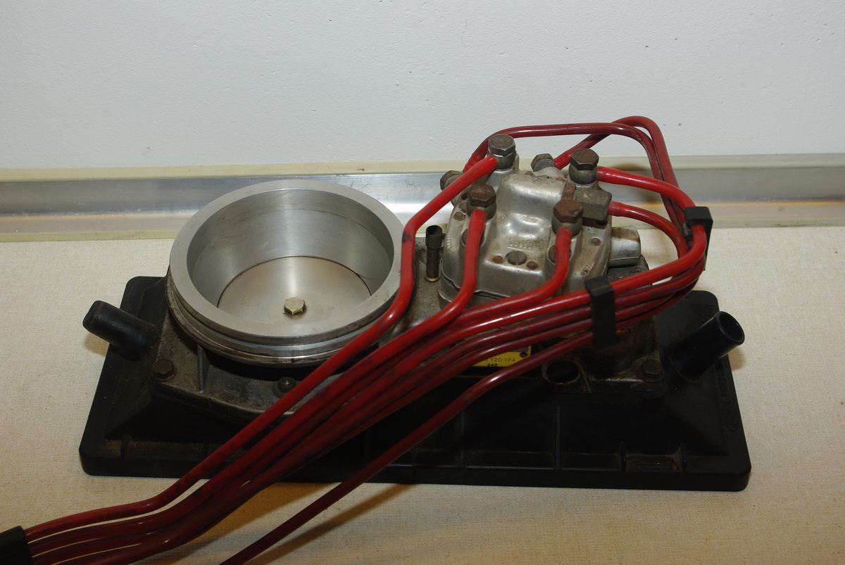 K-Jetronic Mengenteiler mit Stauscheiben-Luftmengenmesser, Einspritzleitungen und Oberteil Luftfilterkasten aus einem Escort XR3i BJ. 81 - 86